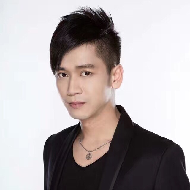 中文（台灣）: 夜牛的照片